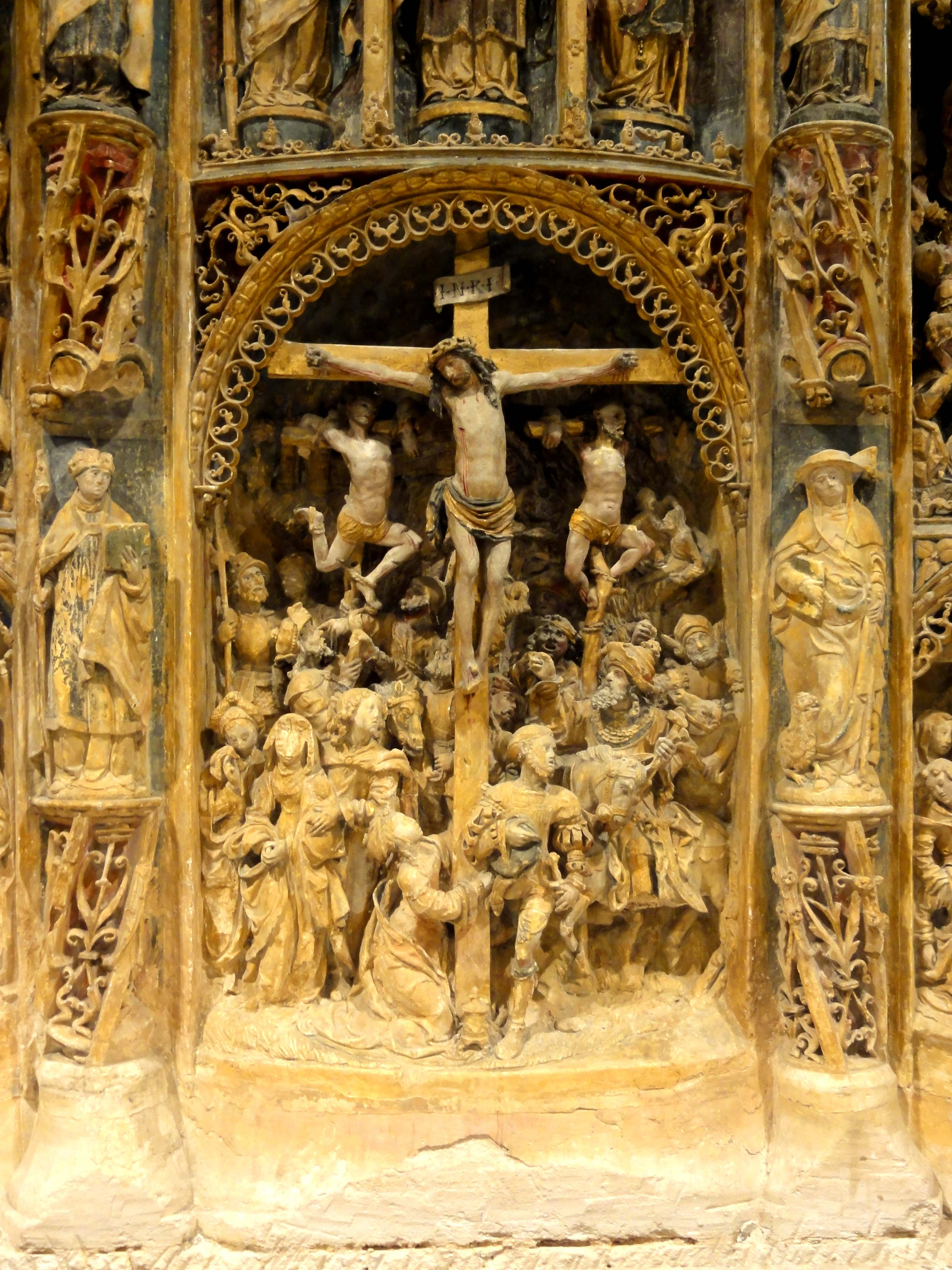 Retable de Nucourt - voir titre.